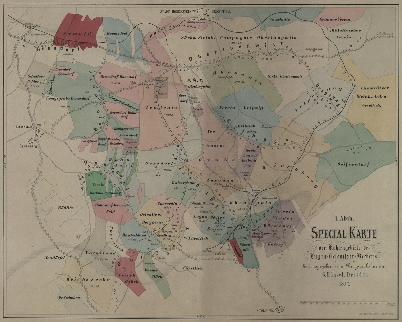 Spezialkarte der Kohlengebiete und Gruben des Lugau-Oelsnitzer Becken